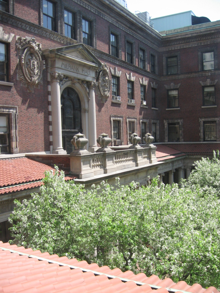 Milbank@Banard_College